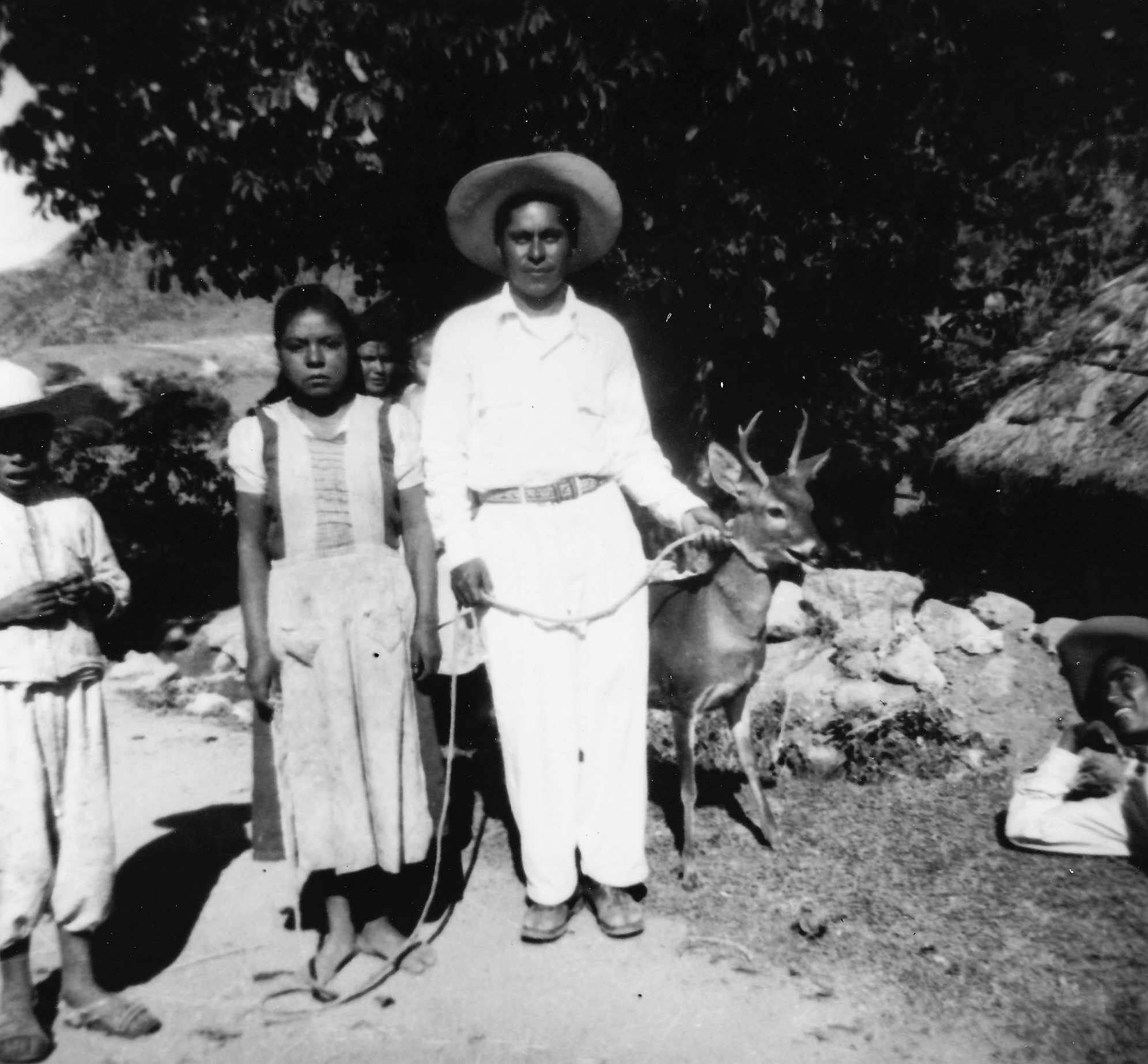 Campesinos con venado, San Juan Achiutla, Oaxaca, México, 1945. Quien sujeta al venado es Jesús Ruiz Sánchez.